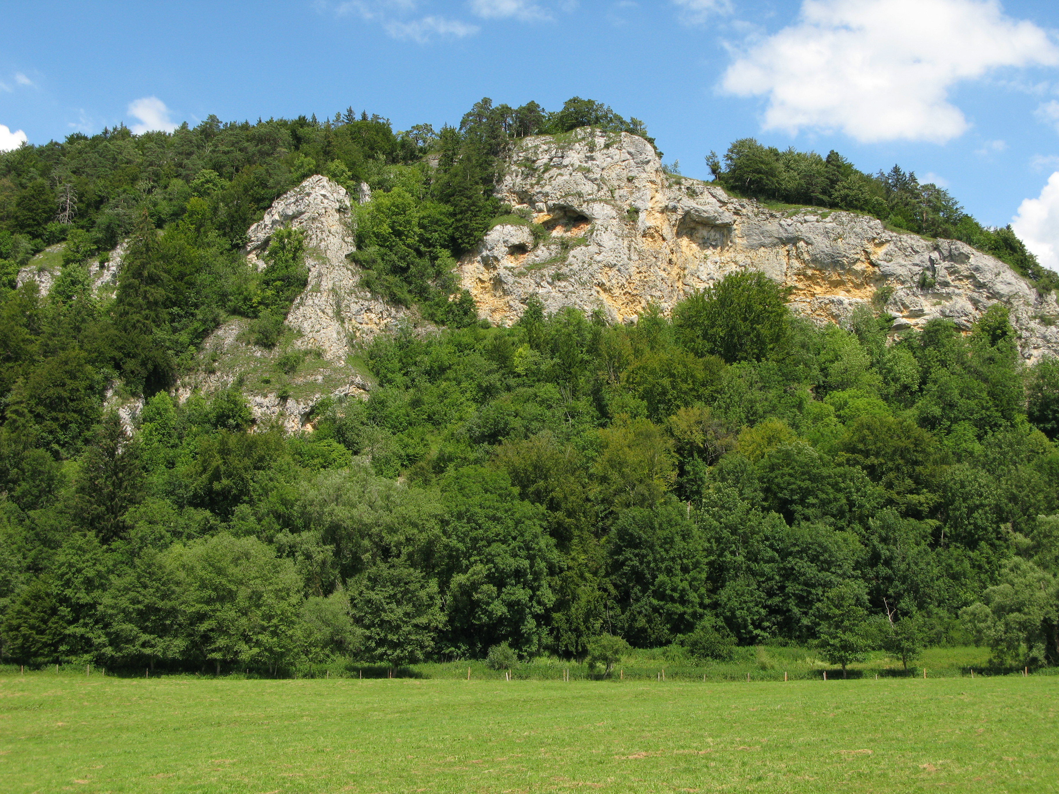 Der Laibfelsen oberhalb der Donau bei Fridingen am Donauberglandweg auf der Schwäbischen Alb.